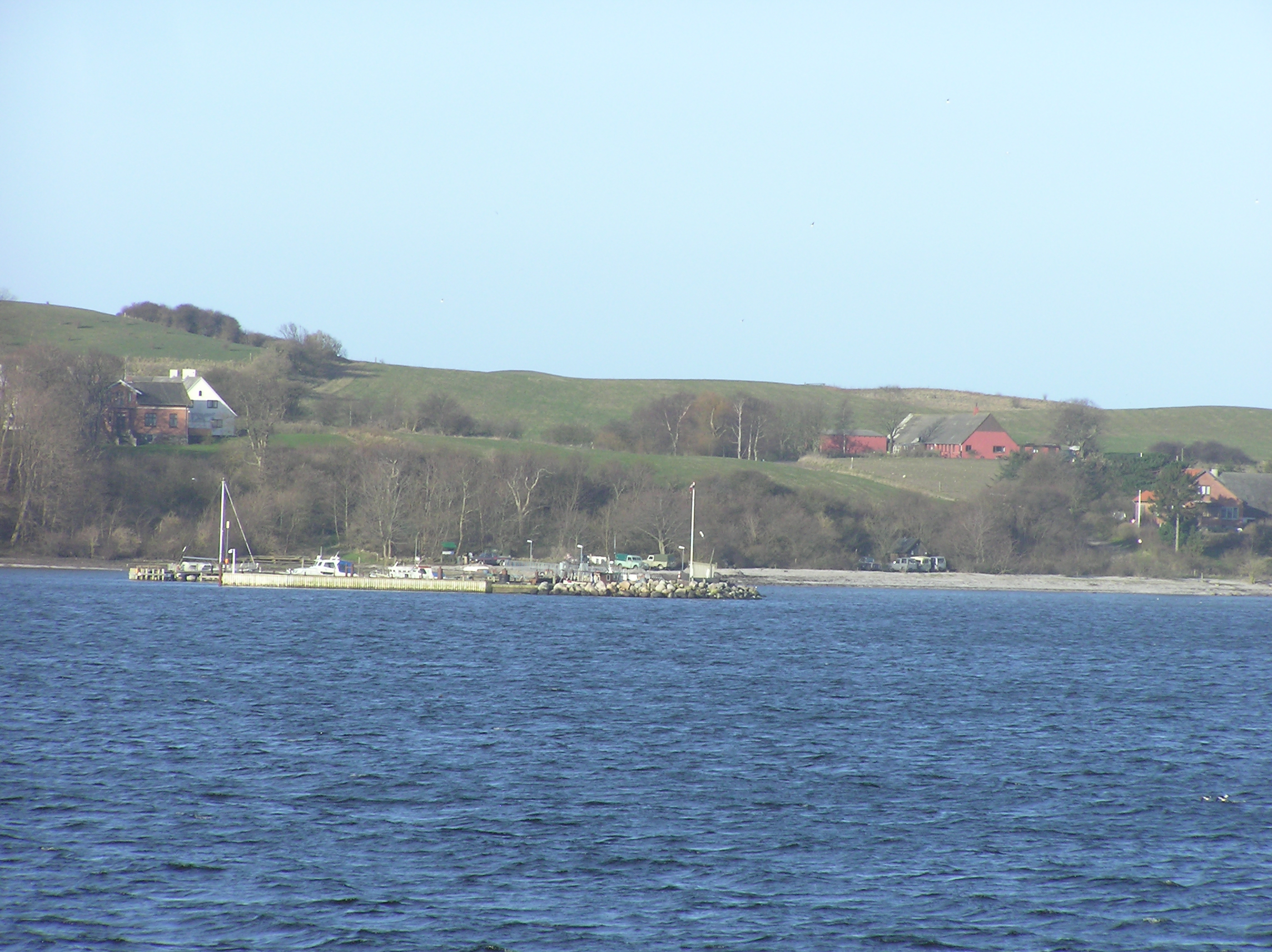 Danmark Sjælland Nekseø Anleger